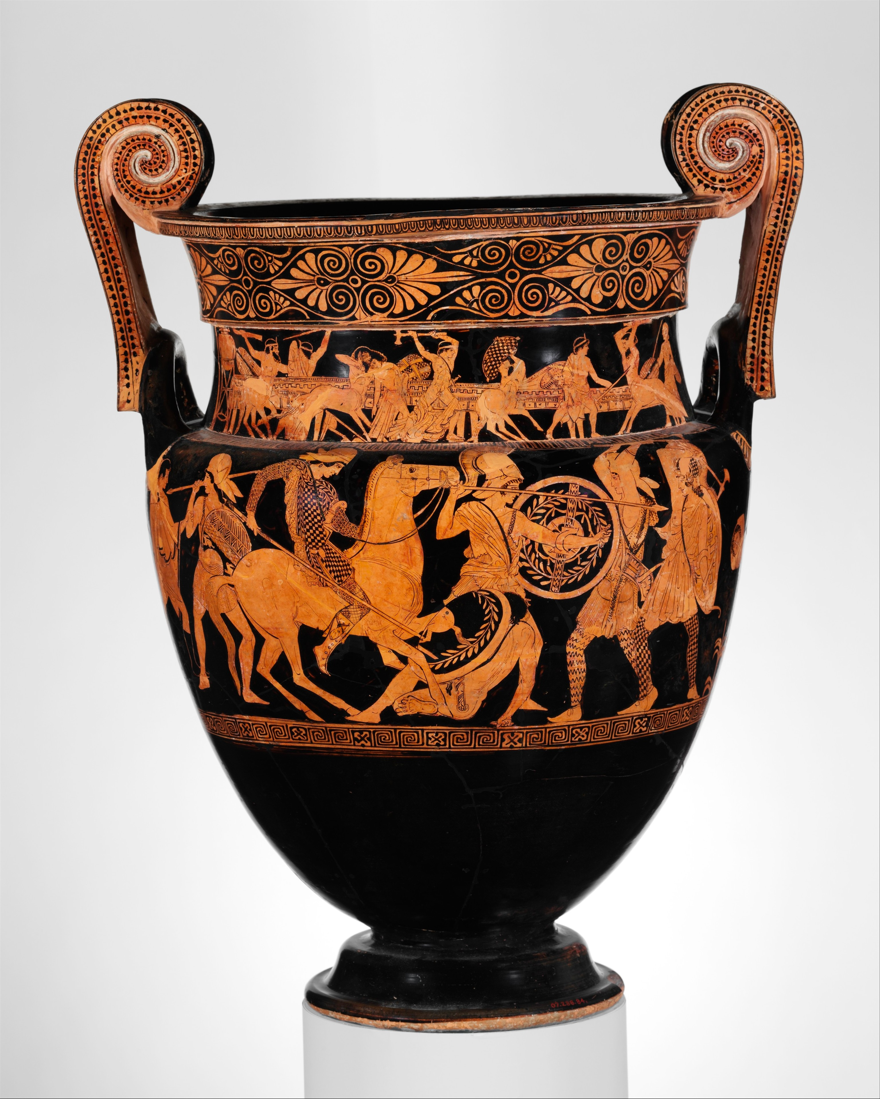 Greek, Attic; Volute-krater; Vases